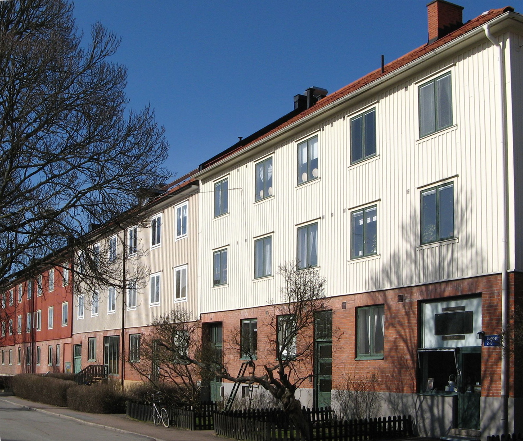 Photo: Thomas Höjemo. Kvarteret Åkermyntan, Lugnet 8, Göteborg, built 1931-1934.